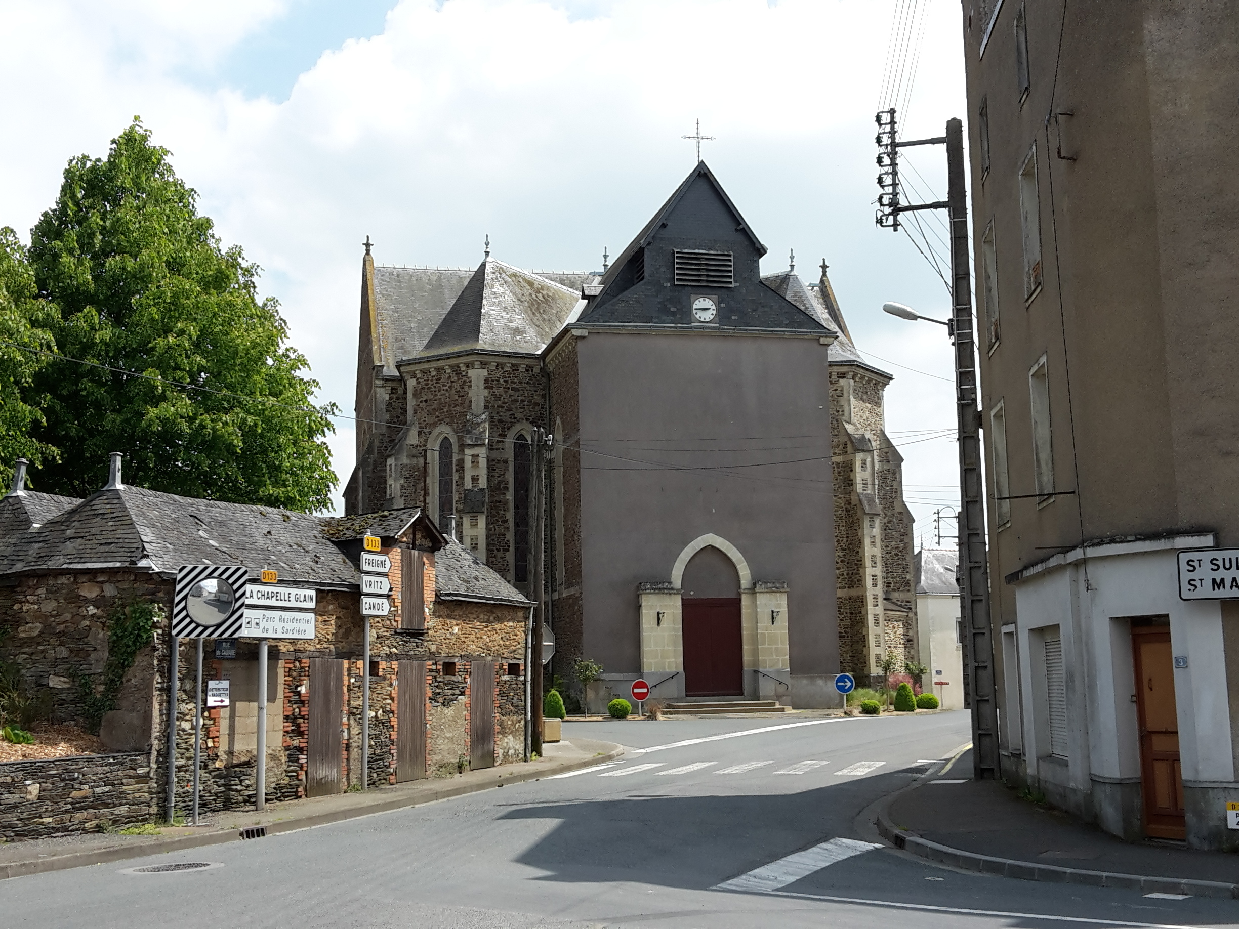 Eglise du Pin, Le Pin, Loire-Atlantique, France.